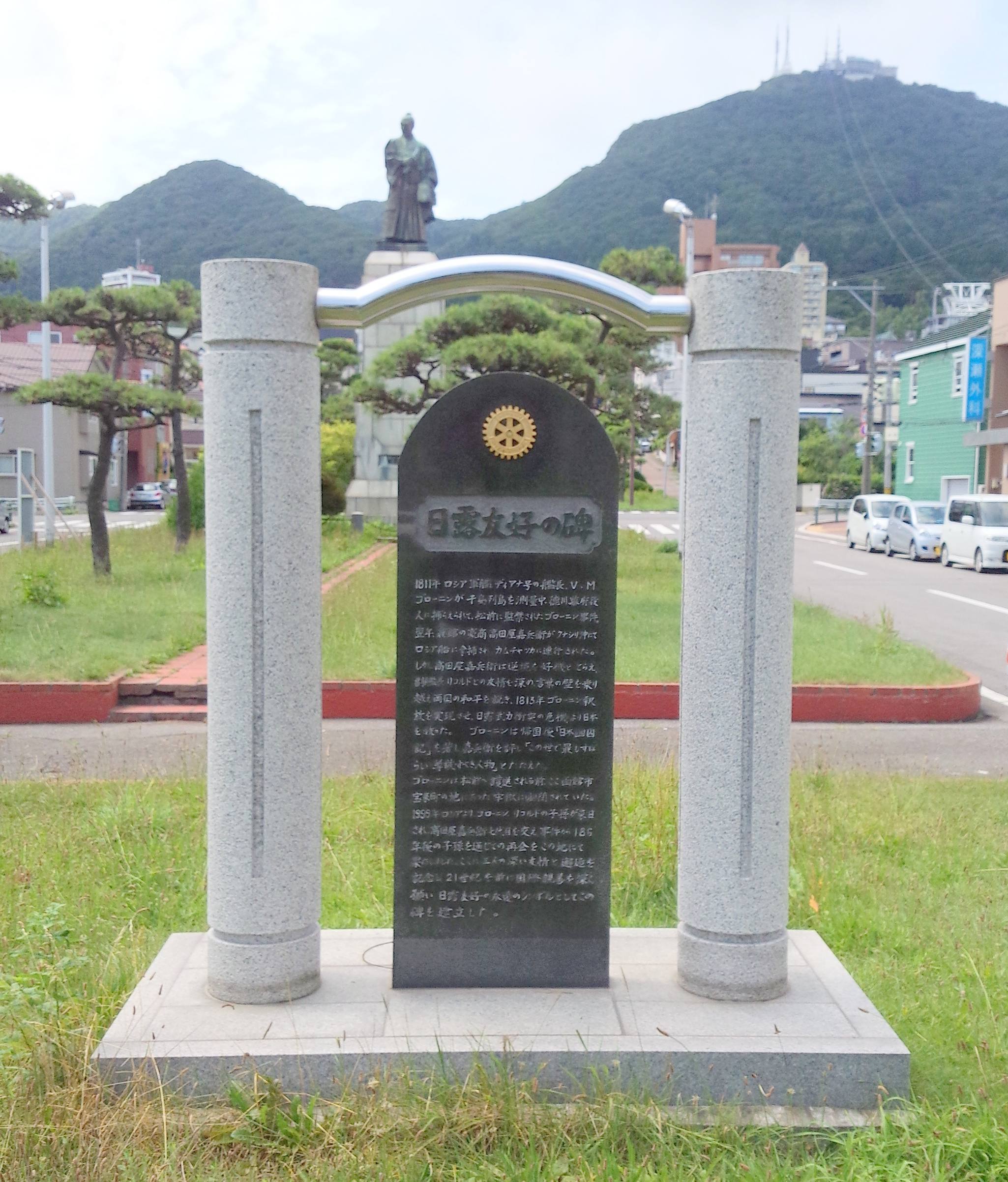 北海道函館市護国神社坂にある、日露友好の碑